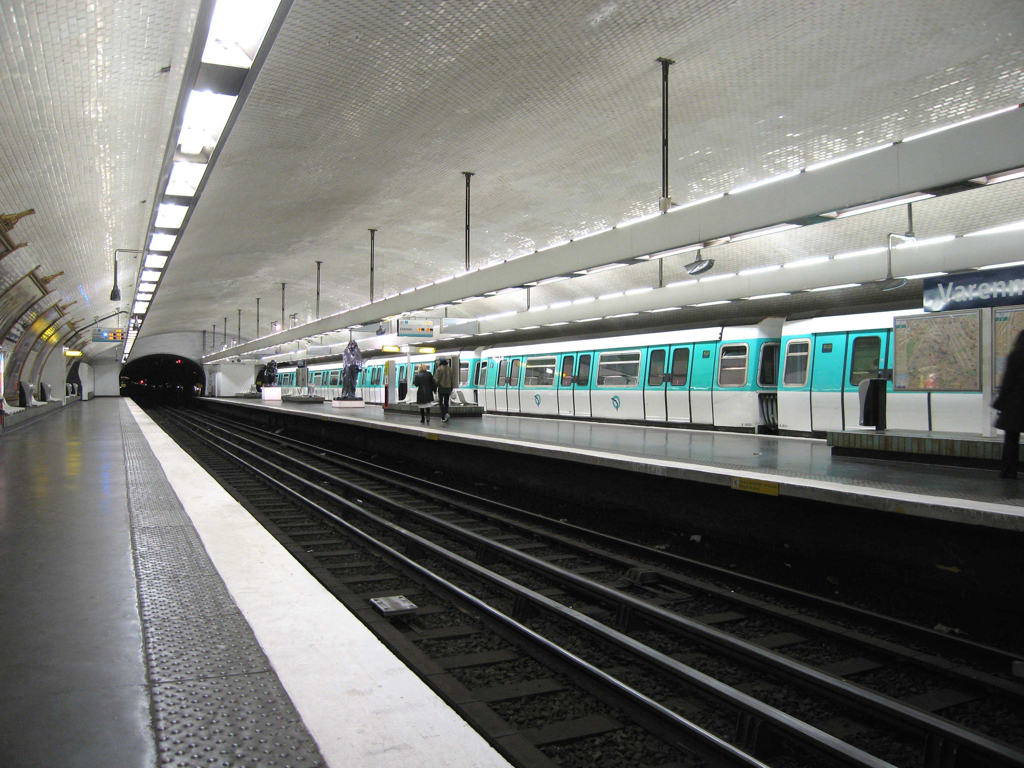 Métro de Paris, Station Varenne (ligne 13), Paris, France